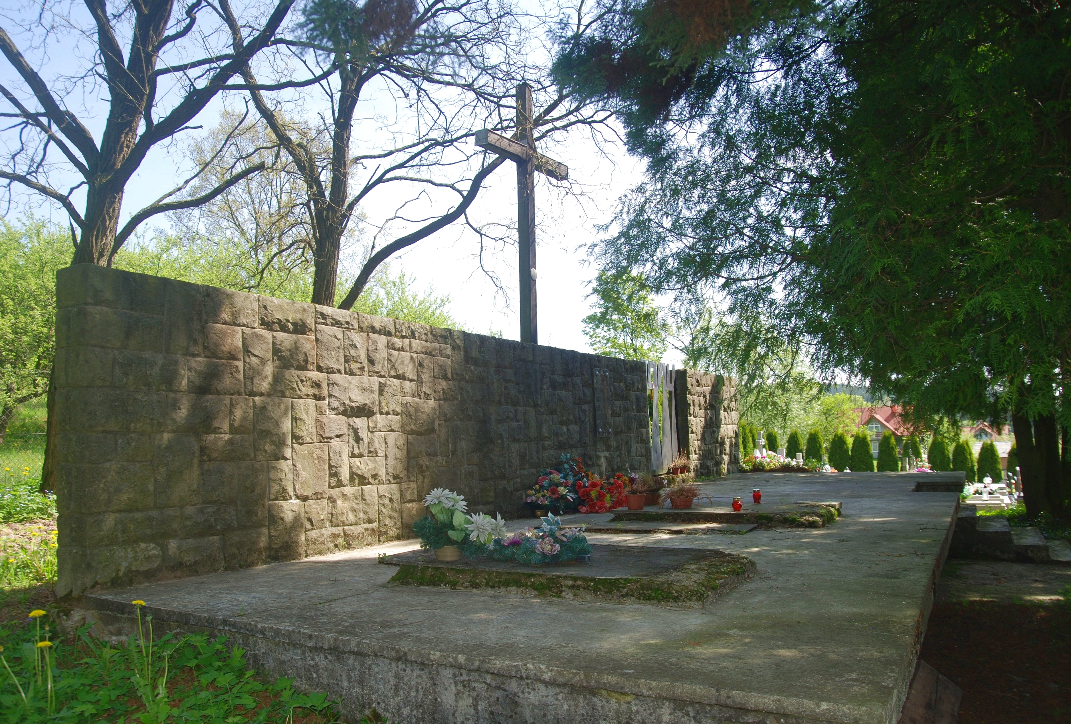 wieś Binczarowa